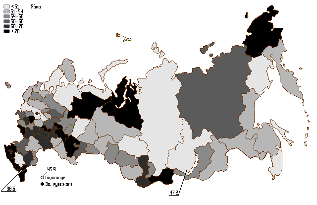 явка на парламентских выборах в России 2011 год